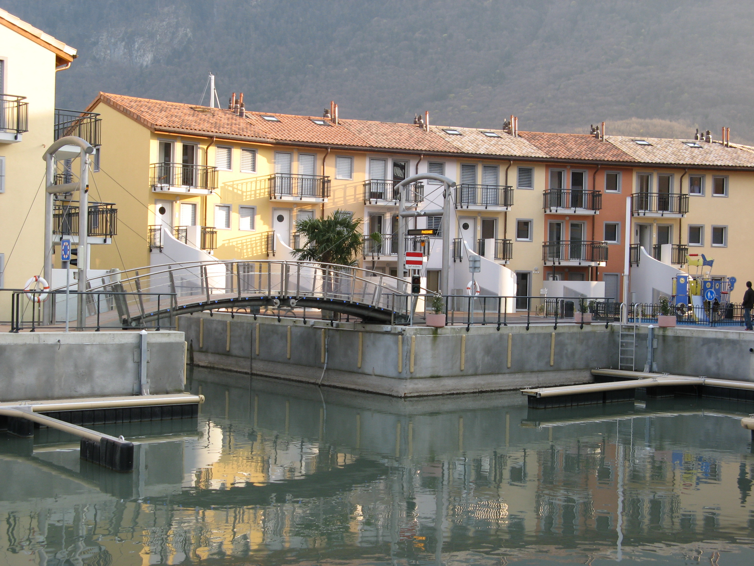 Le Bouveret, Valais, Switzerland.